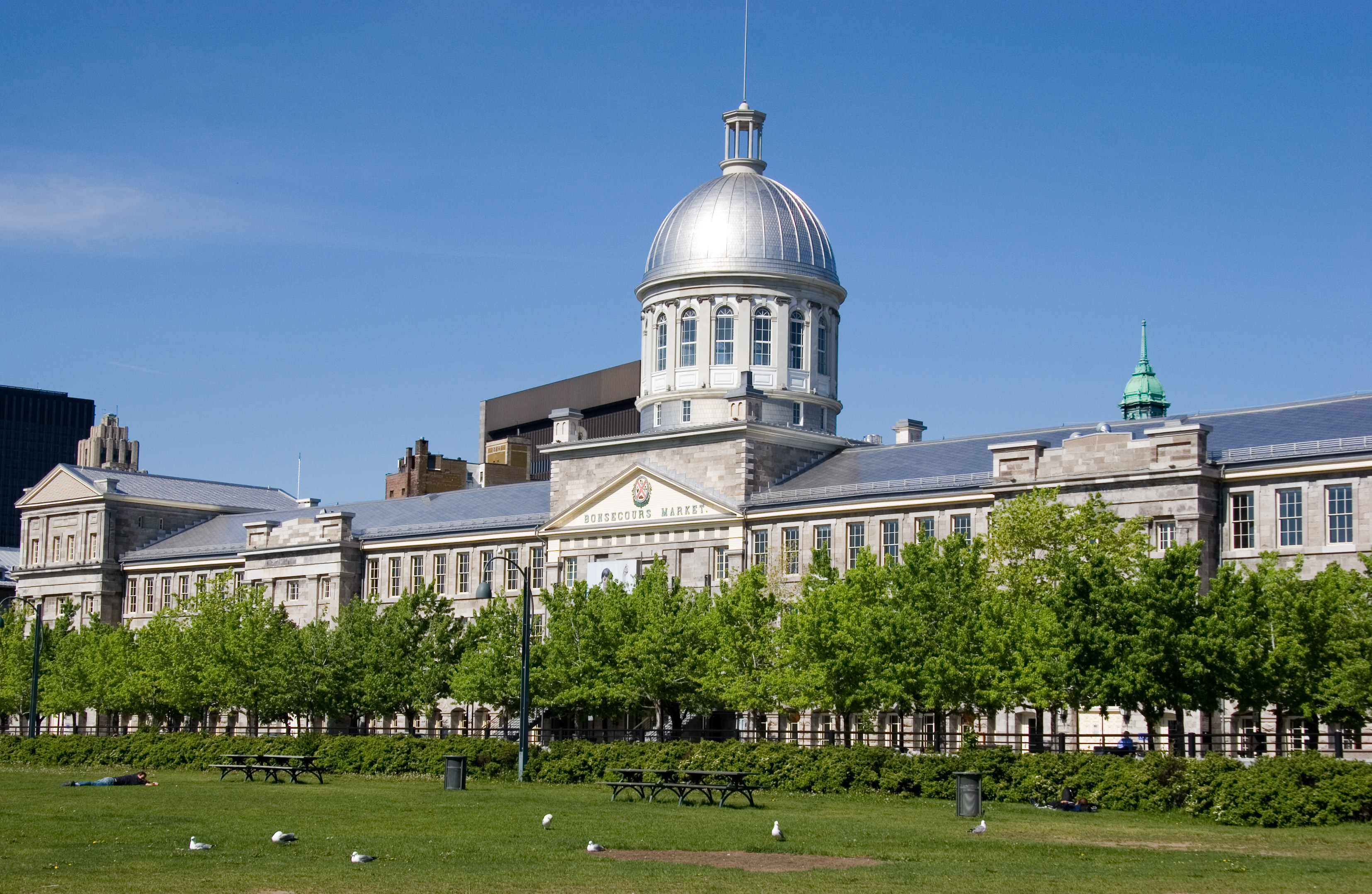 Marché Bonsecours (from Vieux-Port) in Montréal, Québec, Canada